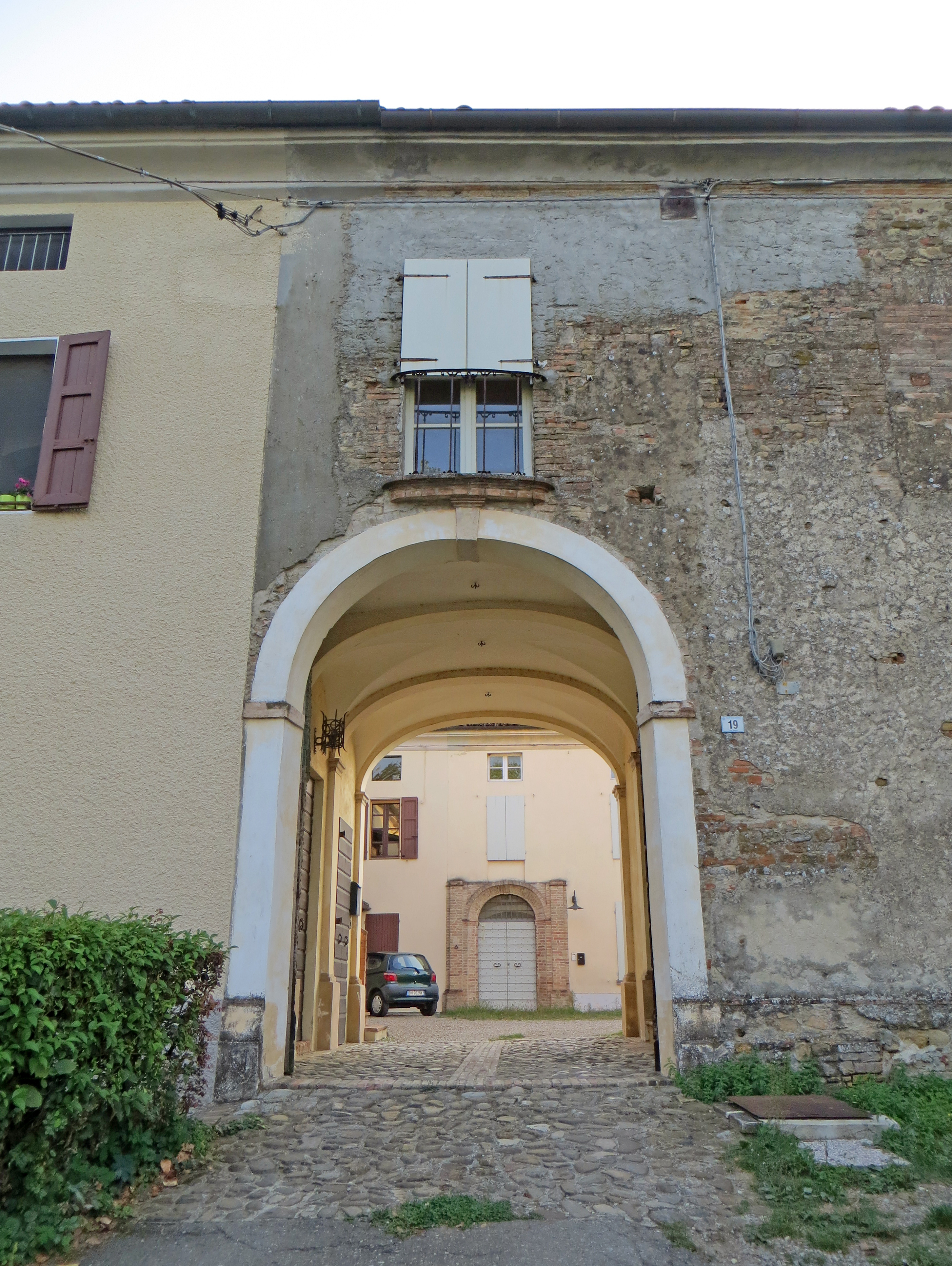 Ingresso alla corte del castello di Segalara This is a photo of a monument which is part of cultural heritage of Italy.